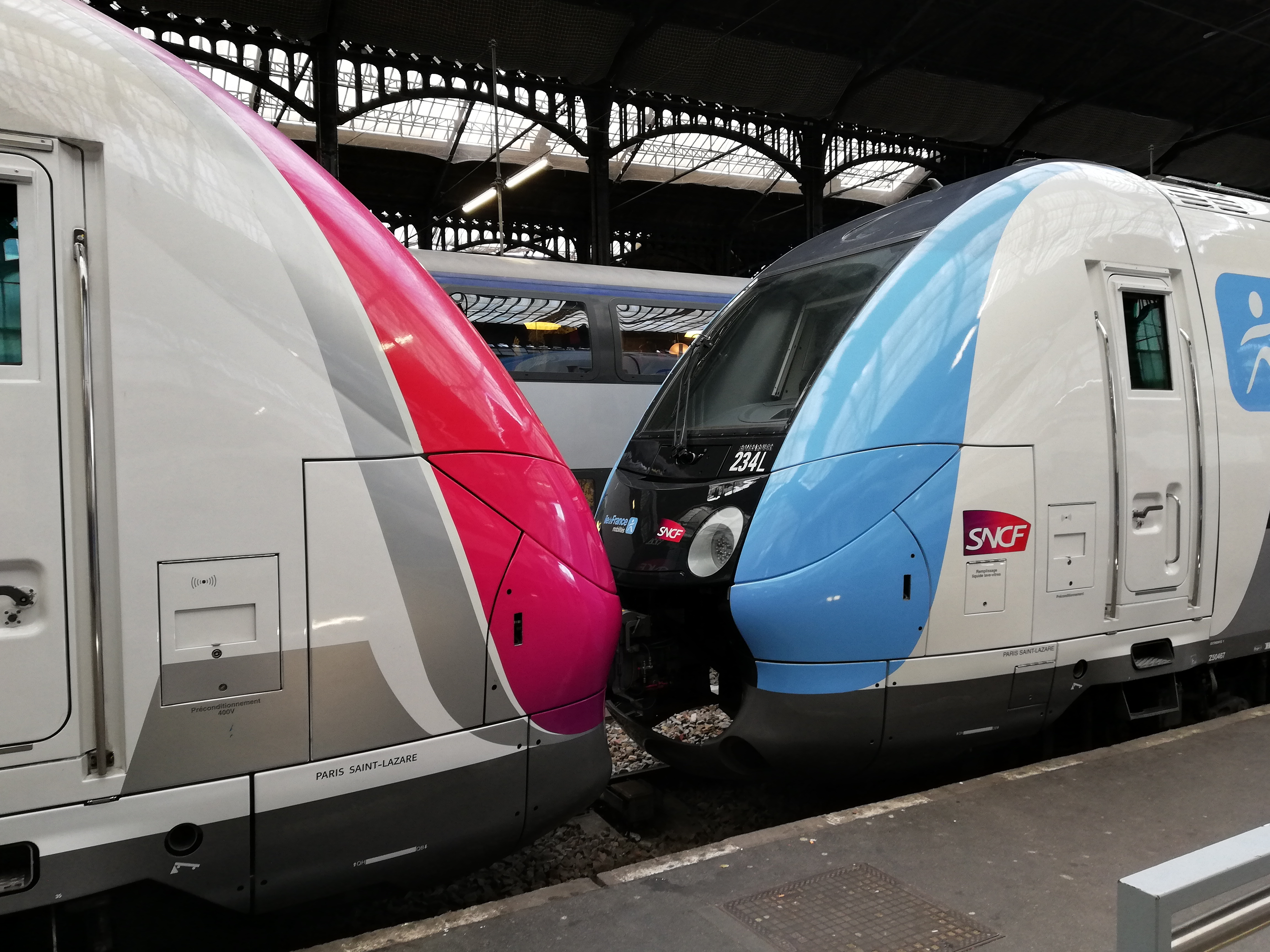 En gare de Paris-Saint-Lazare, attelage de deux Franciliens de livrées différentes (à droite, Île-de-France Mobilités, à gauche, Carmillon), en 2018.